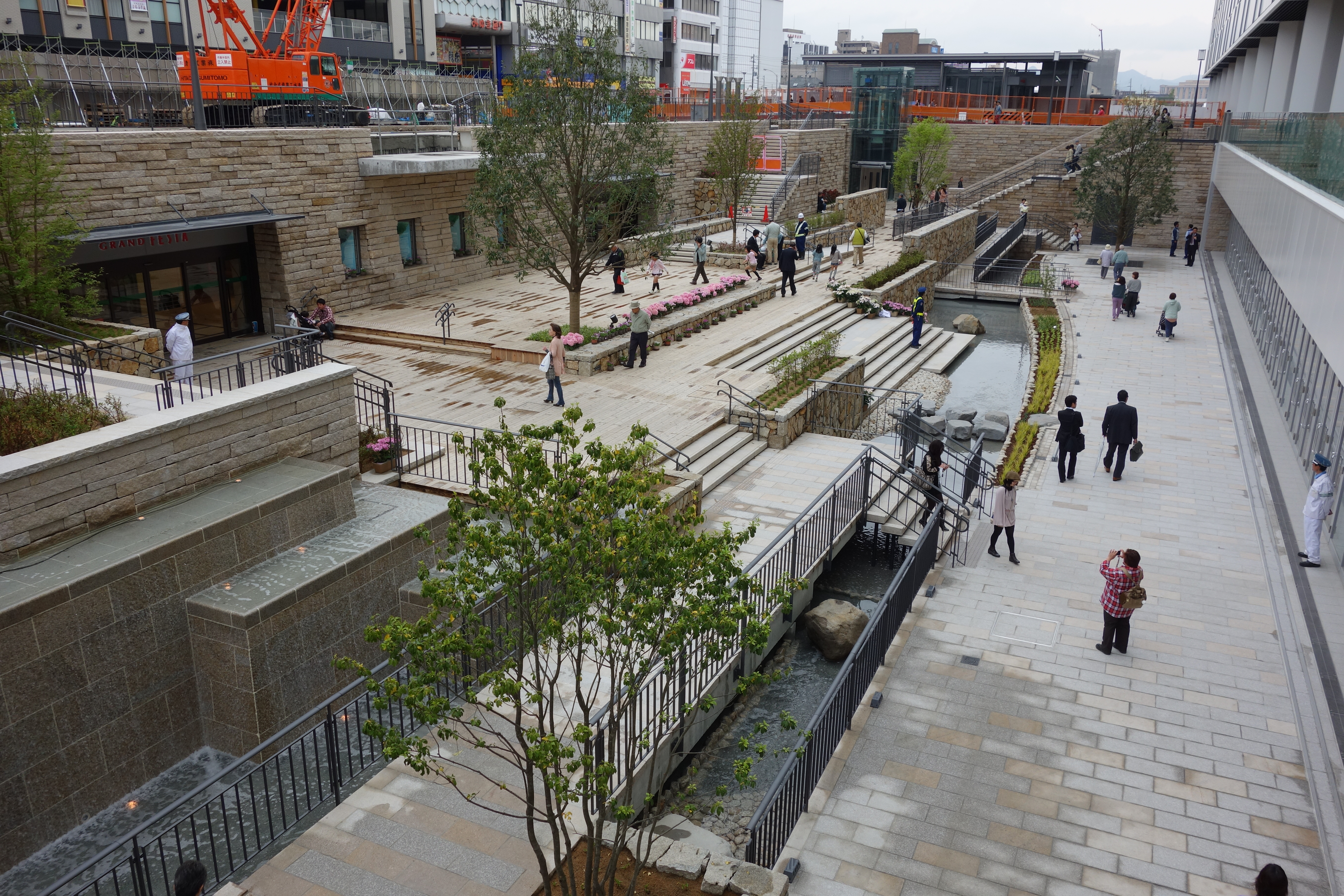 サンクンガーデン（ピオレ姫路隣接） （2013年4月30日撮影）